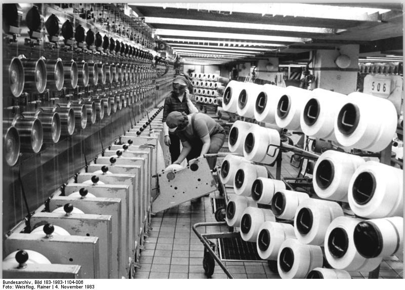 Guben, polnische Gastarbeiterinnen ADN-ZB Weisflog 4.11.83 Bez. Cottbus: Achtfachspinnen verdoppelt Maschinenleistung- Im Gubenar Chemiefaserwerk "Herbert Warnke" ist jetzt das sogenannte Achtfachspinnen an einer Anlage zum Herstellen von Polyesterfeinseide produktionswirksam. Renate Matyl (v.) und granzyna Perdoch aus der Volksrepublik Polen sind Spezialistinen an der MAschine. Gegenüber dem traditionellen Vierfachspinnen steigt die Leitung auf 183 Prozent. Die Anzahl der Fäden, die jeweils aus einer Spinndüse gelangen, hat sich verdoppelt. Zur Einführung des effektiven Verfahrens wurde eine zehn Jahre alte Spinnmaschine umgebaut und modernisiert. An der Entwicklung der neuen Technologie war ein Jugendforscherkollektiv des Werkes maßgeblich beteiligt.